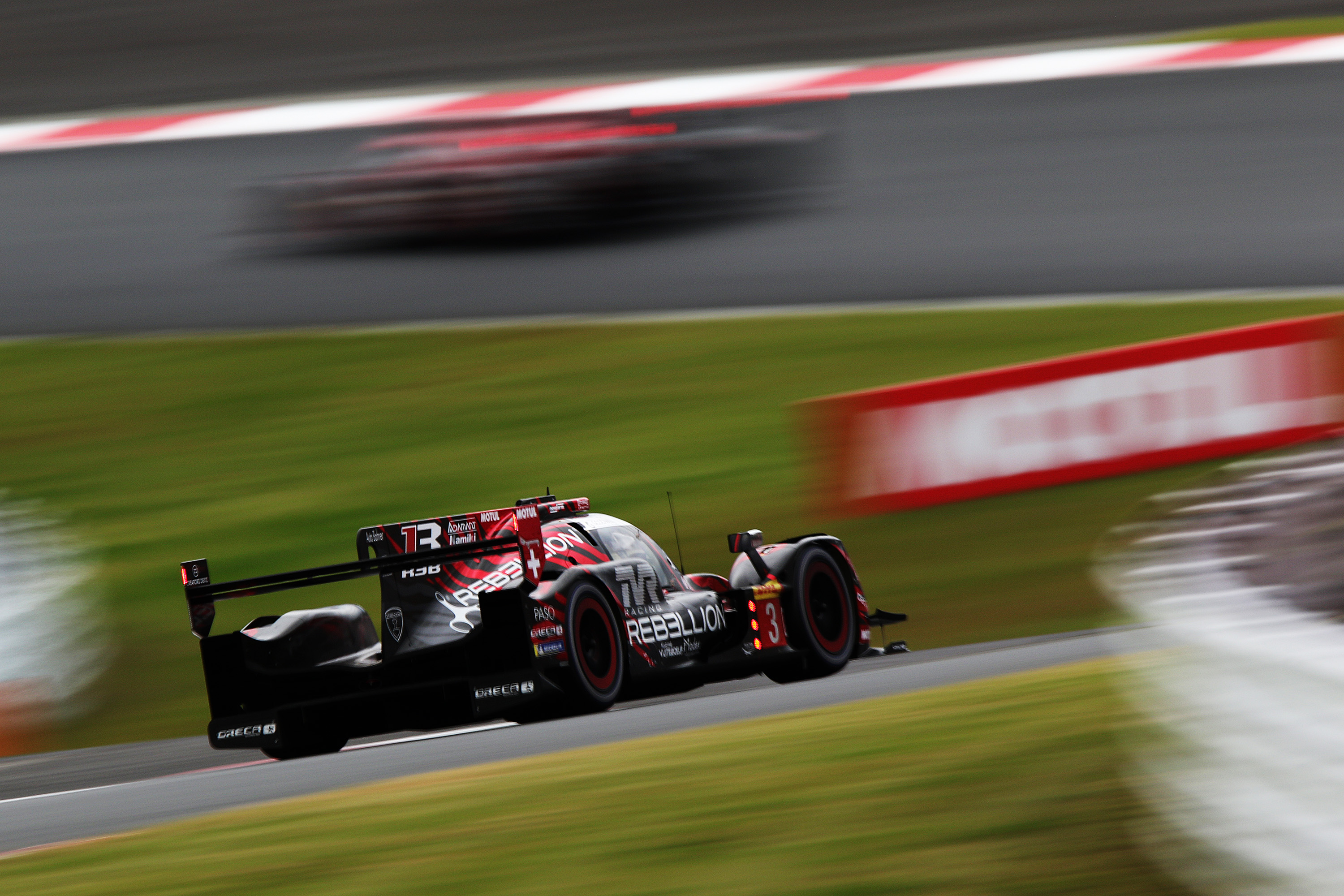 2018 6 Hours of Fuji.